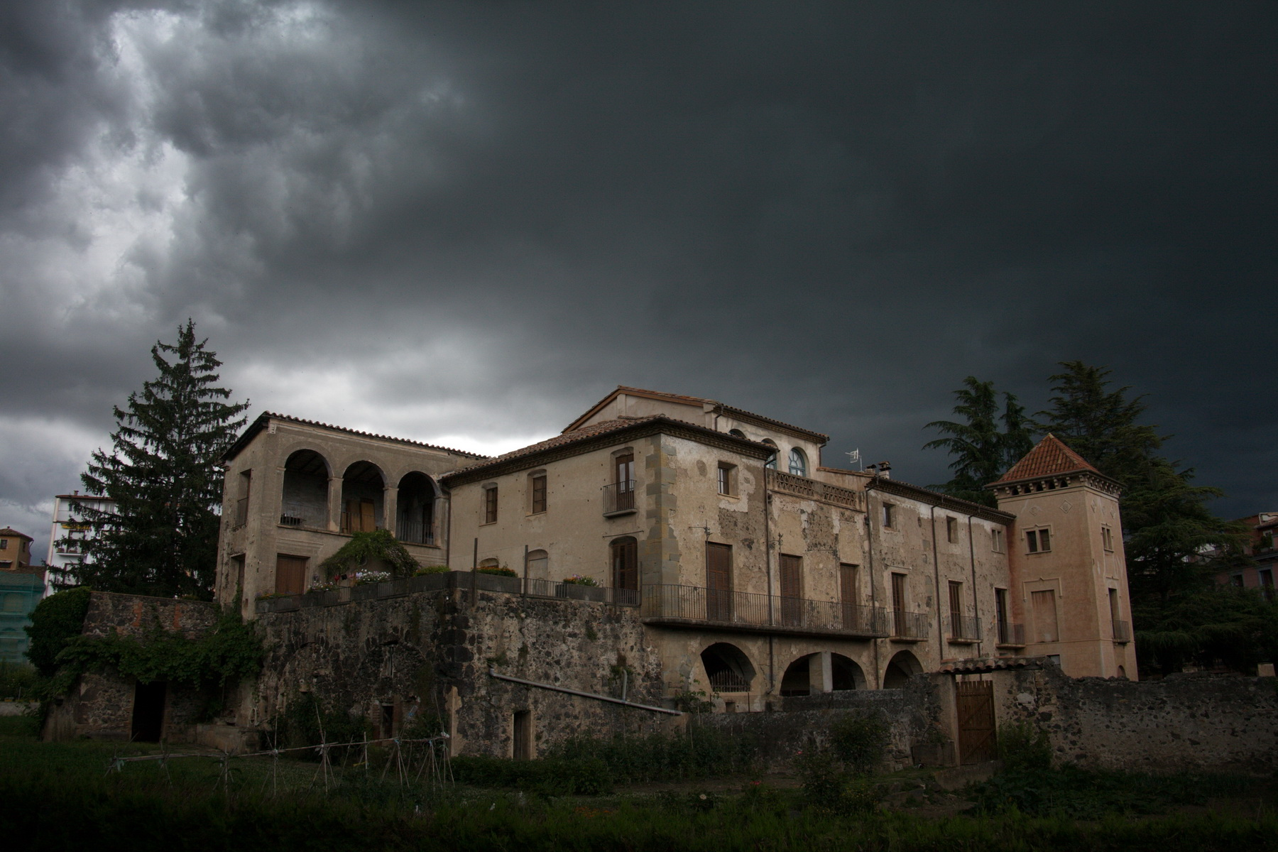 Casa Vayreda (Olot)